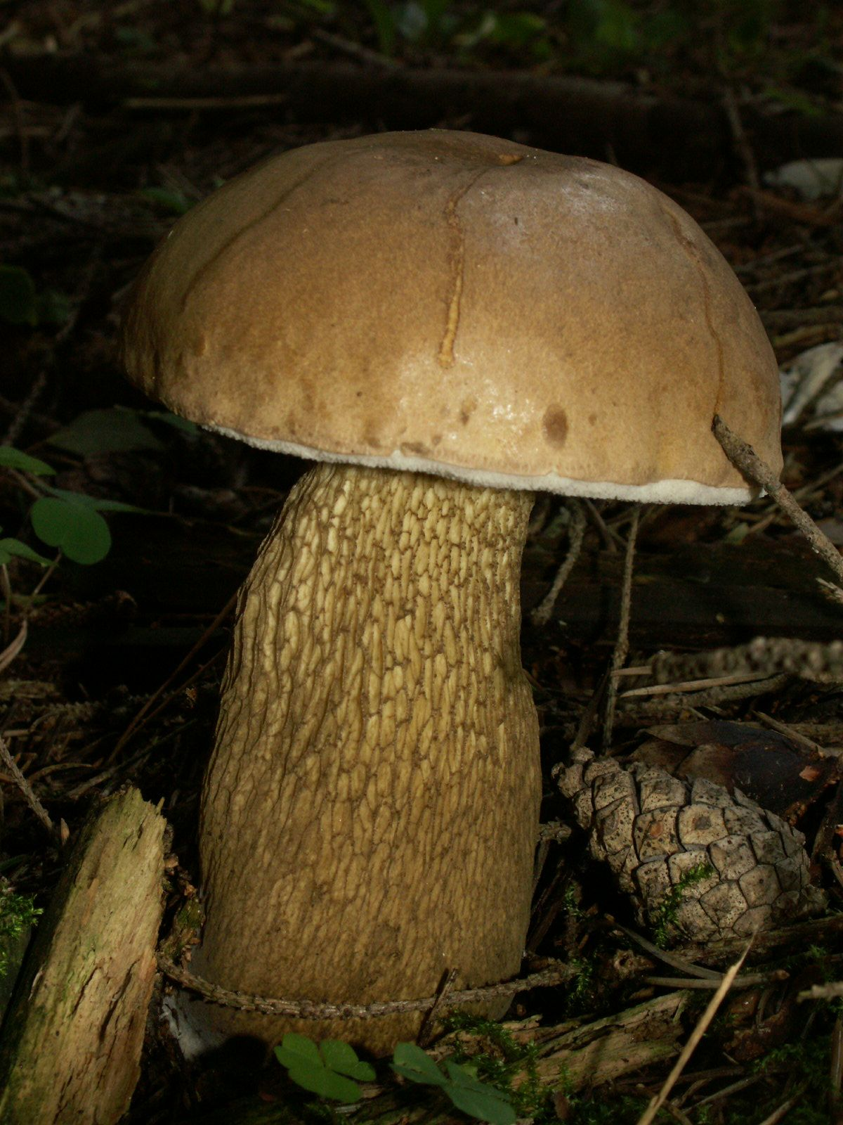 Tylopilus felleus